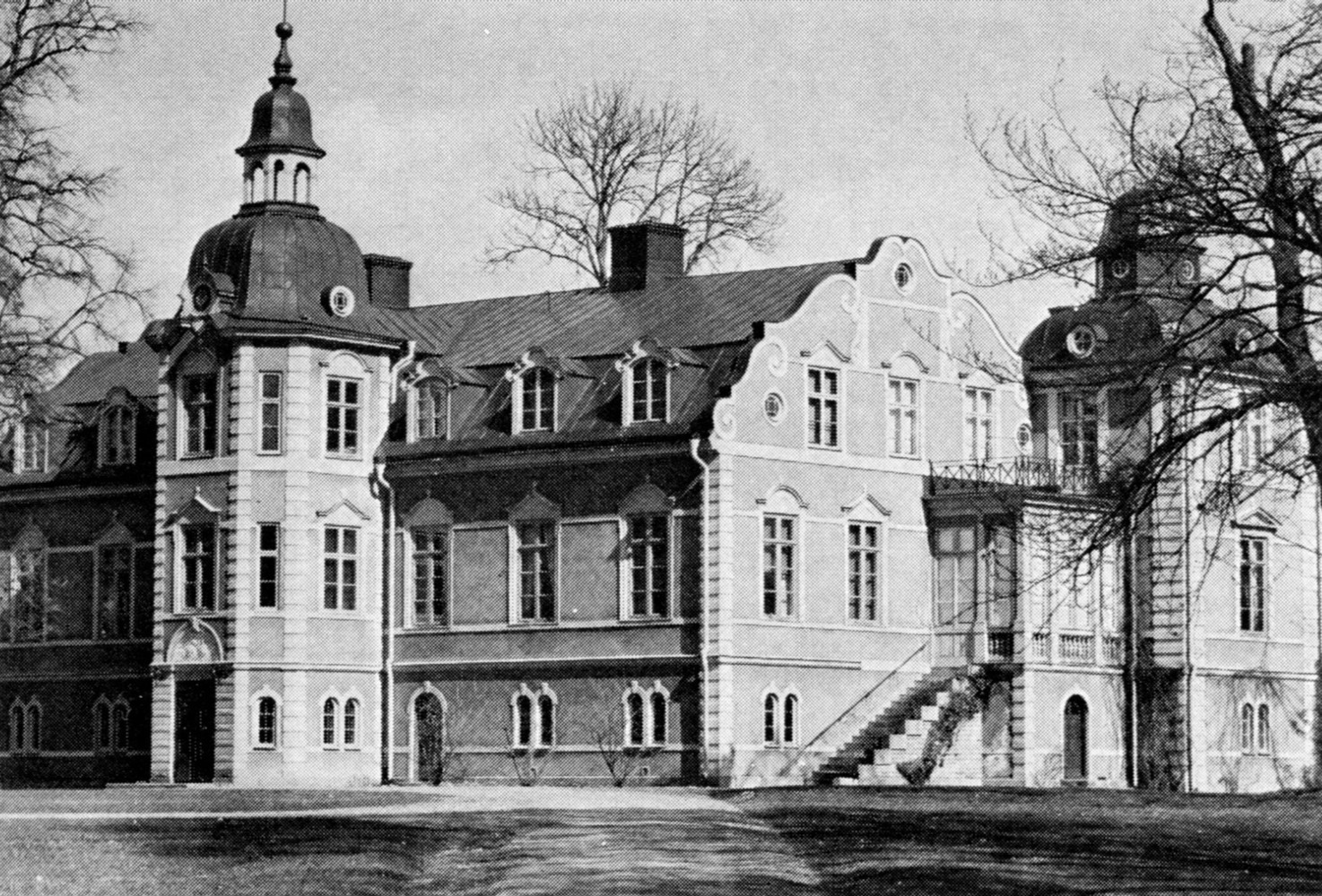 Sjöholms gård huvudbyggnad, arkitekt Fredrik Wilhelm Scholander